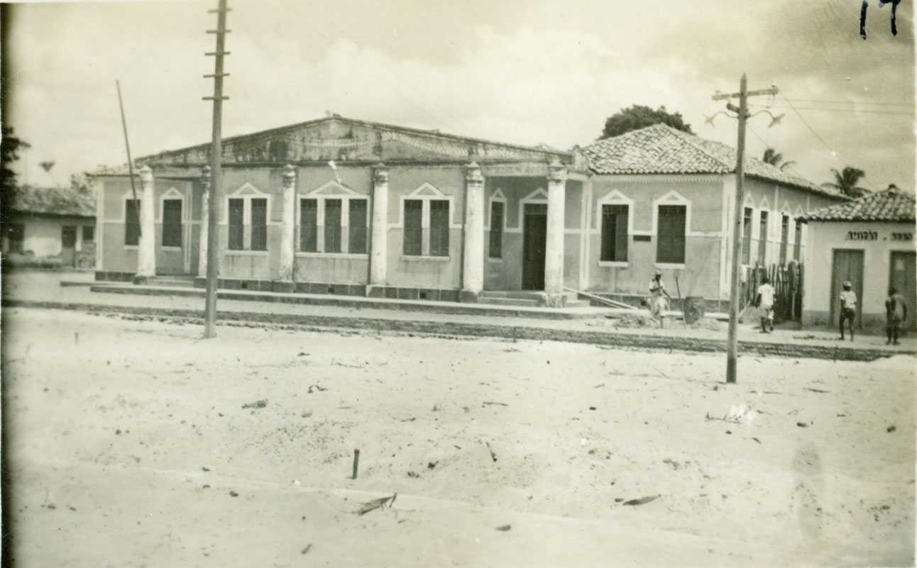 Preitura Municipal e Agência de Estatística de Humberto de Campos, MA.